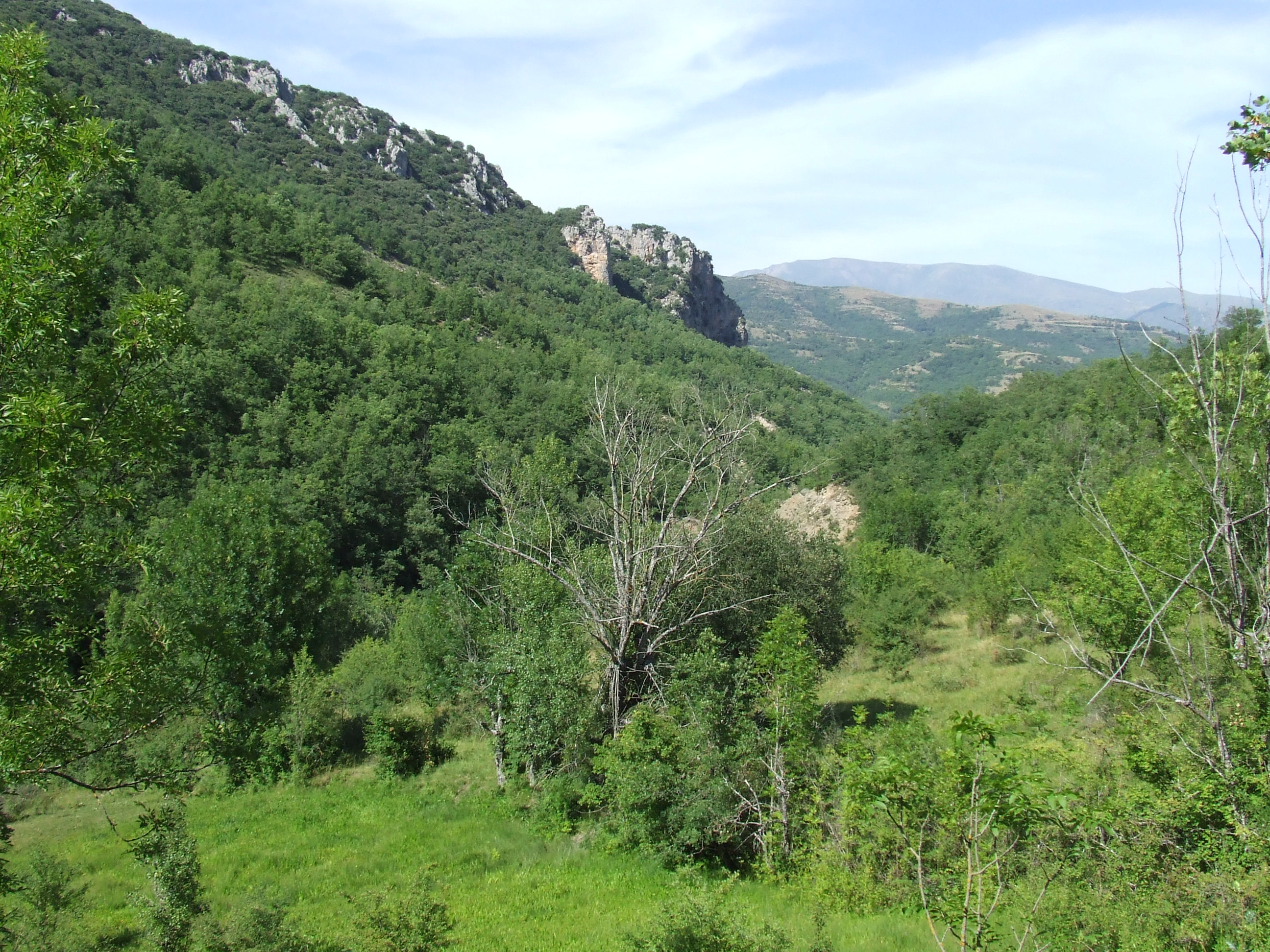 Vall del riu de Cadolla i Quadra de Miravet (Senterada, Pallars Jussà)